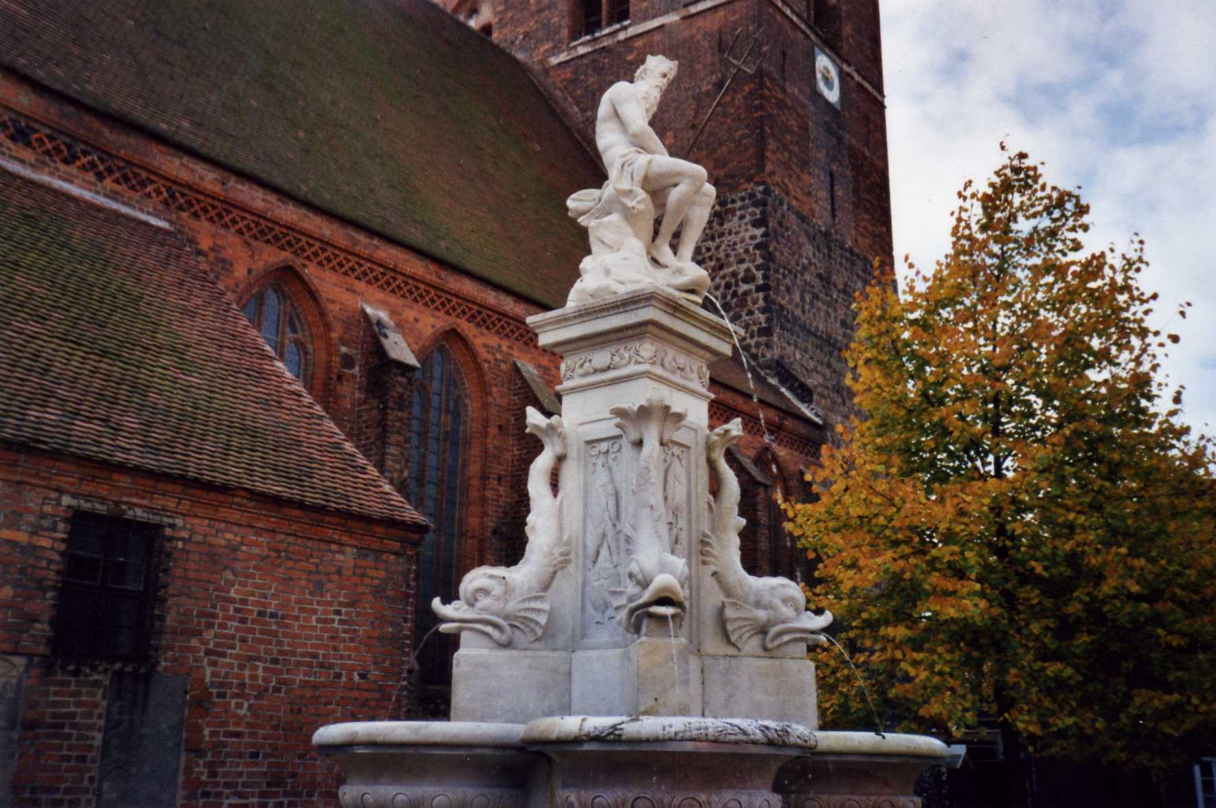 Historischer Brunnen in Osterburg vom alten Rittergut in Rönnebeck